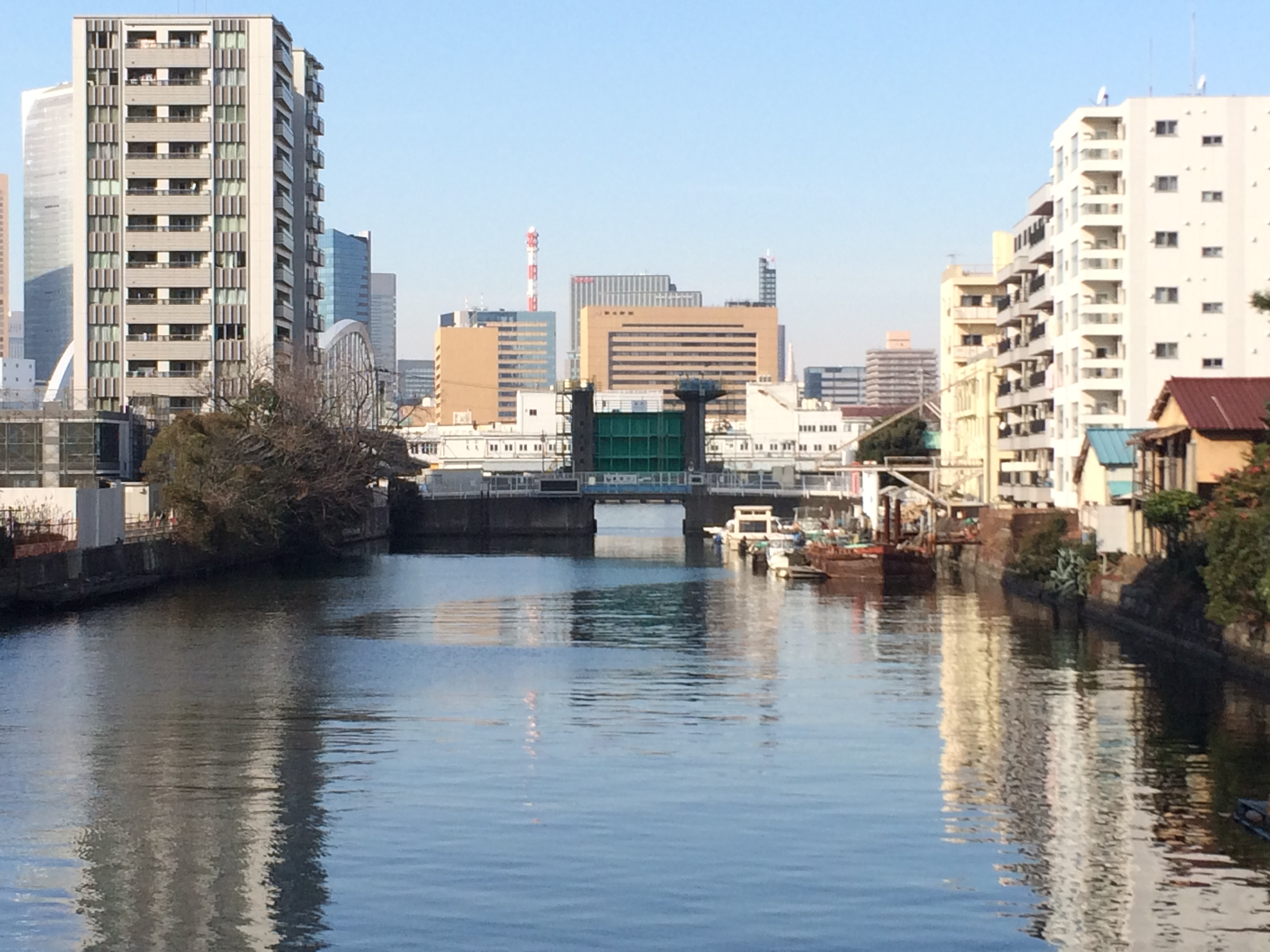 新島橋から新月島川をながむ。